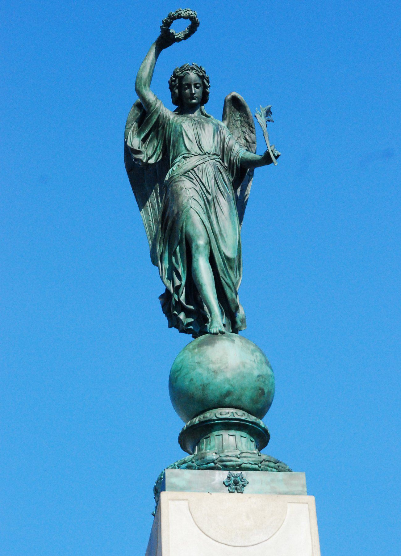 Die Figur auf der Spitze des ehemaligen Kopal-Denkmals auf dem Komenski-Platz in Znaim